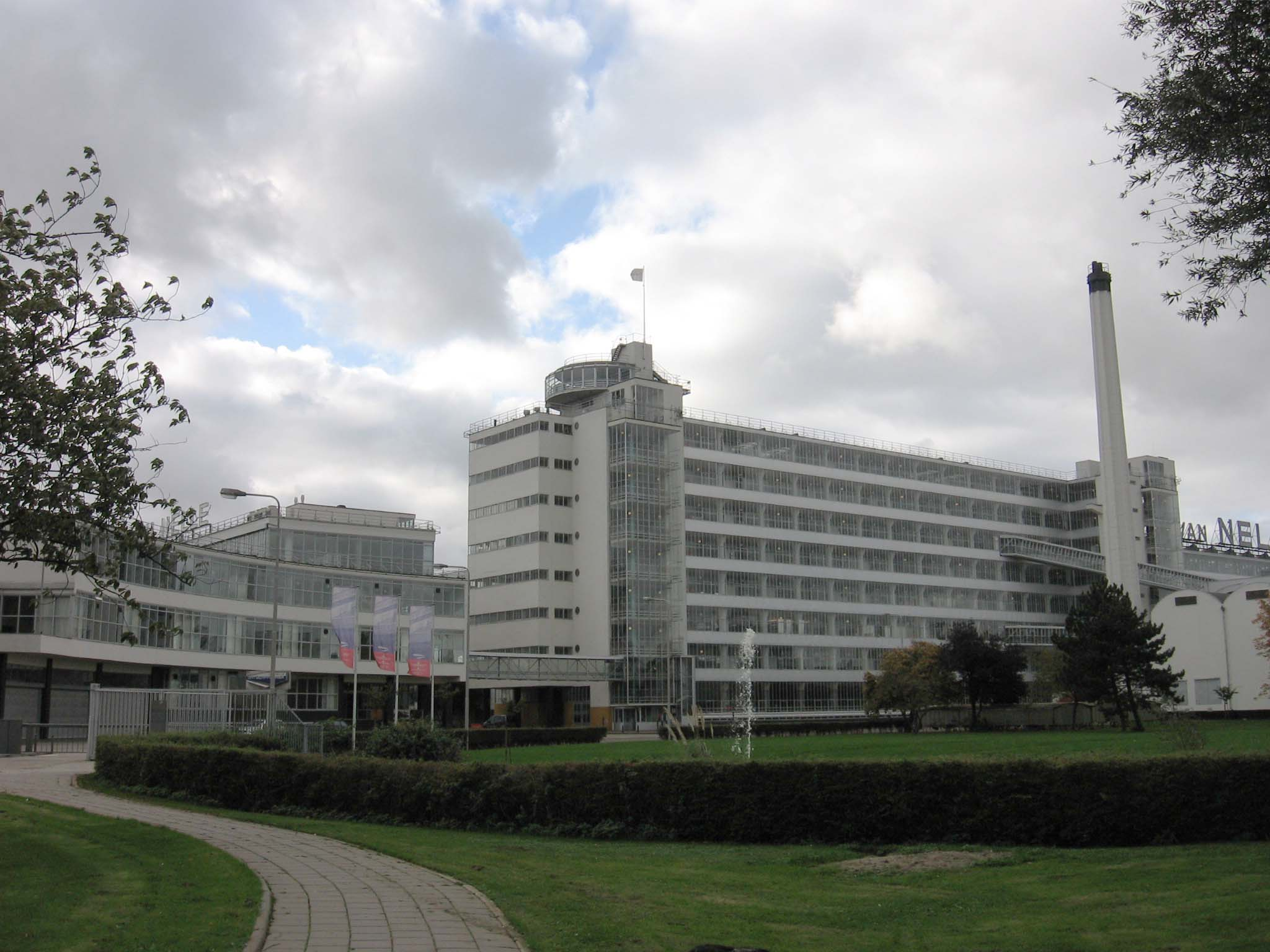 Van Nelle, Overschie